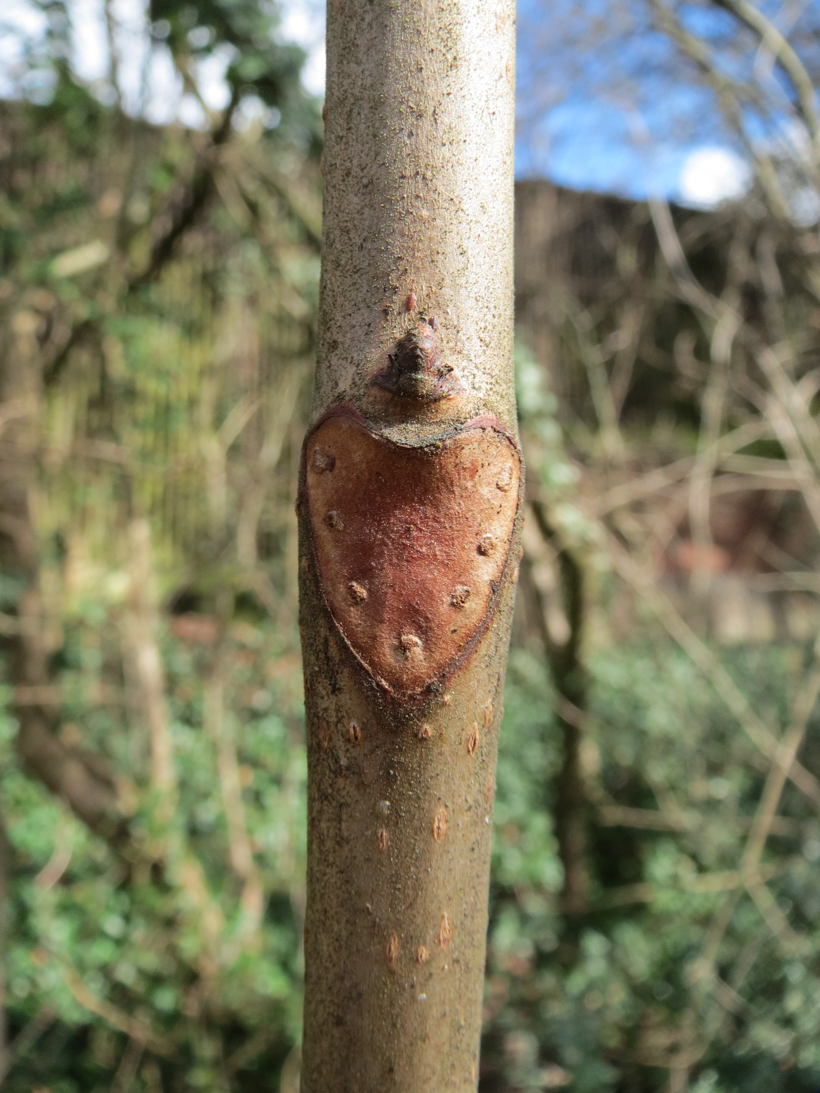 Rosskastanie (Aesculus hippocastanum) in Saarbrücken